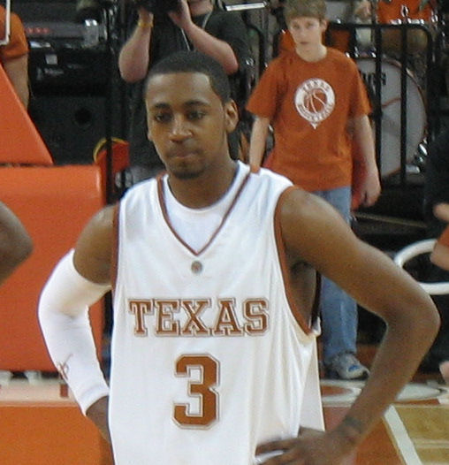 AJ Abrams